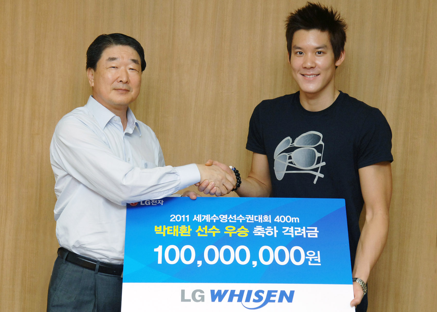 LG전자는 18일 서울 LG트윈타워에서 ‘2011 상해 세계수영선수권 대회’ 400m 부문에서 우승한 박태환 선수에게 우승 격려금 1억 원을 전달하고 LG전자 3D노트북을 선물했습니다 격려금전달식 : LG전자 구본준 부회장(왼쪽)이 박태횐 선수(오른쪽)에게 우승 격려금 1억 원을 전달하고 있다. ※ LG전자 뉴스룸 에서 관련 보도자료를 확인실 수 있습니다.